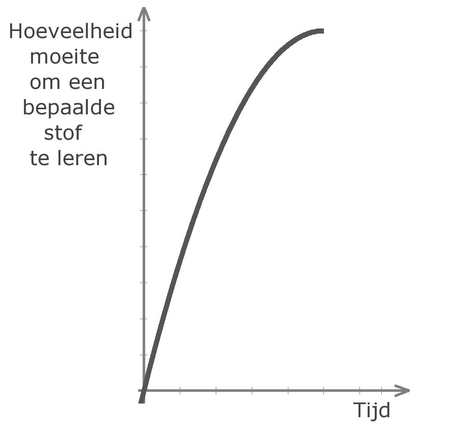 Snel getekend plaatje van een stijle leercurve in de oorspronkelijke betekenis van het begrip